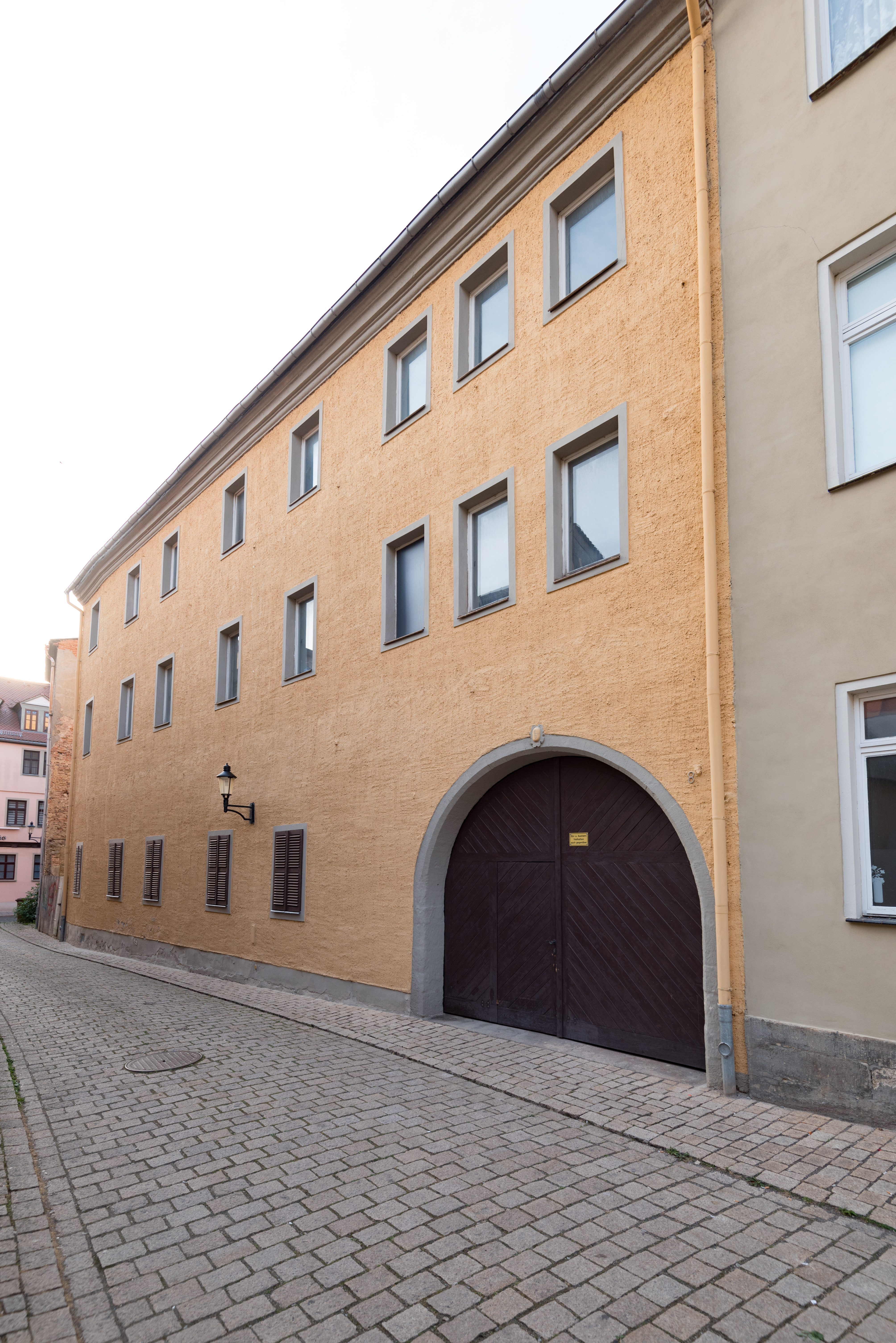 Naumburg (Saale), Mariengasse 8